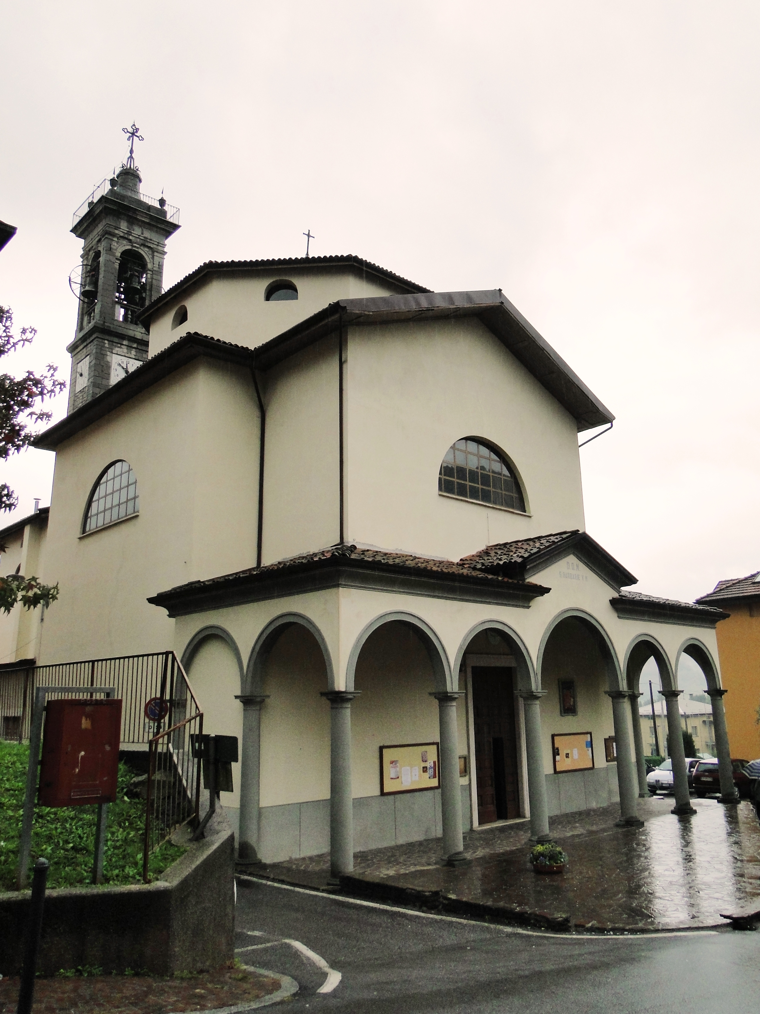 Chiesa parrocchiale di Santa Barbara, Bondo Petello di Albino (BG)